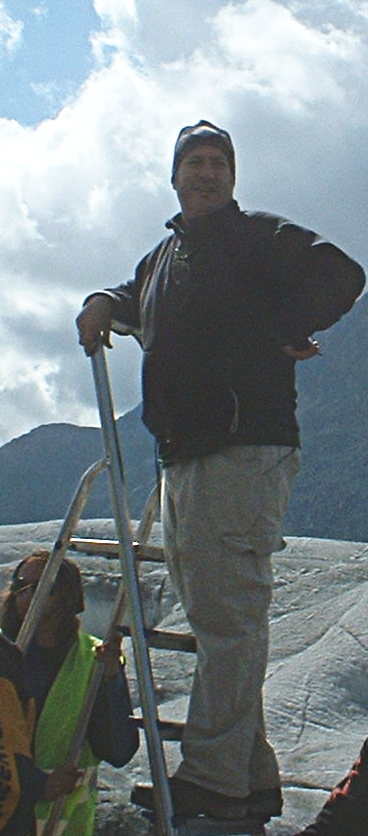 Spencer Tunick, lors de son installation sur le glacier d'Aletsch